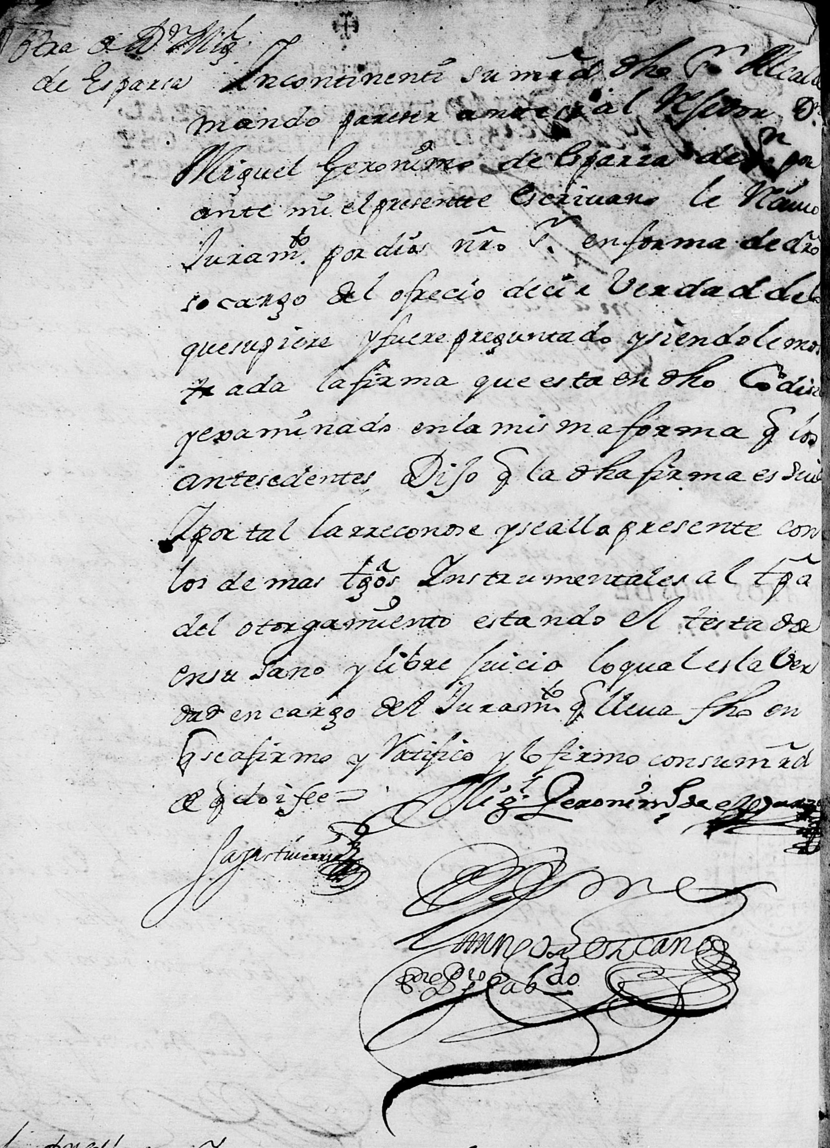 juramento de Miguel Gerónimo de Esparza (1678-1767) como alcalde en segundo voto de la Ciudad de Buenos Aires, en reemplazo de Juan Bautista de Sagastiberria.